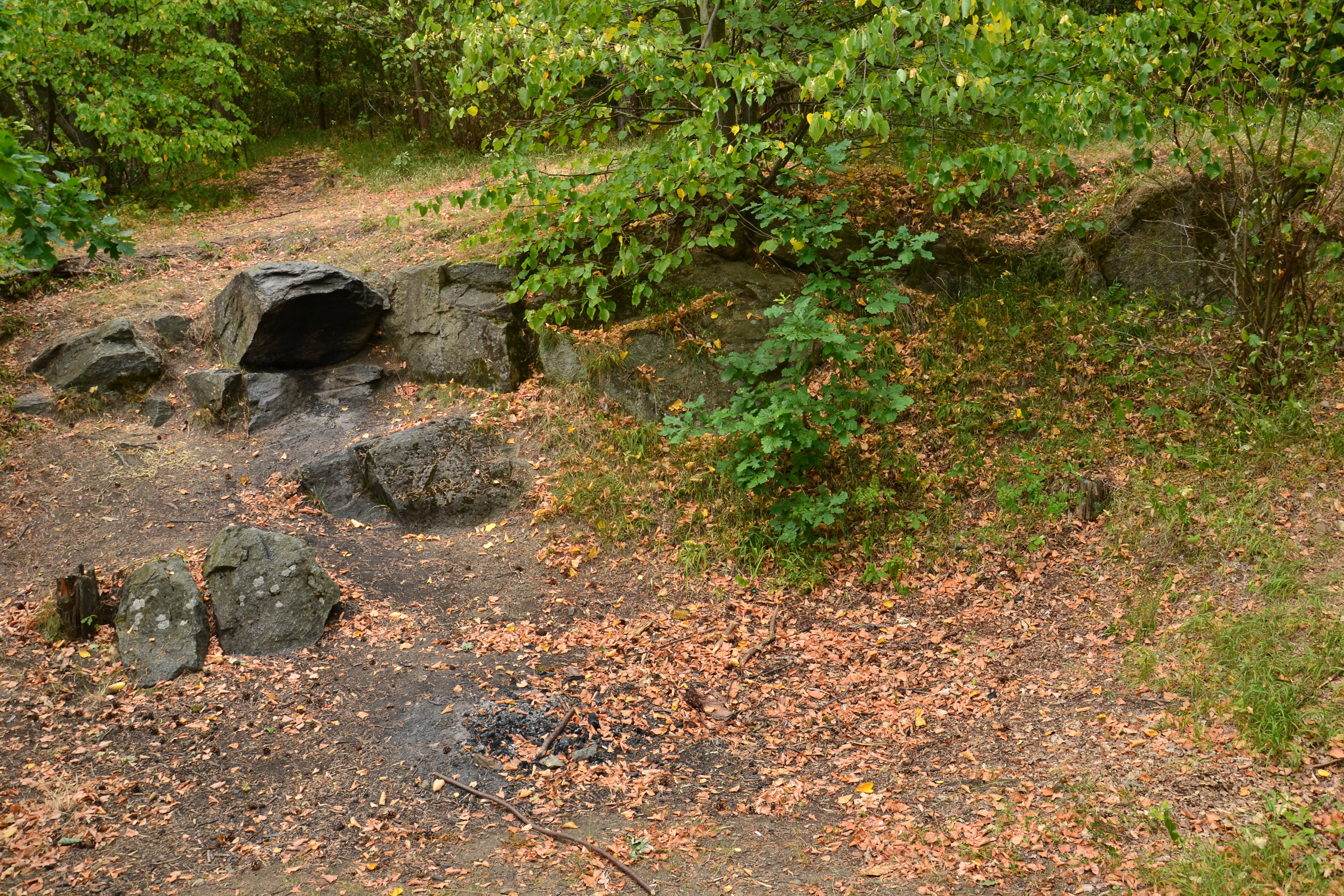 Prohlubeň v hradním jádře